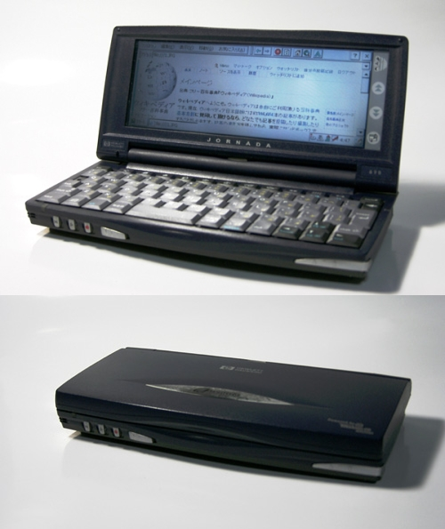 Handheld PC Jornada_690 by Hewlett-Packard